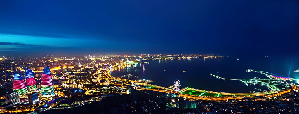 Bakının gecə görünüşü